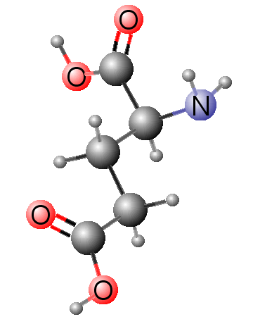 Model prostorová struktury kyselina L-glutamová